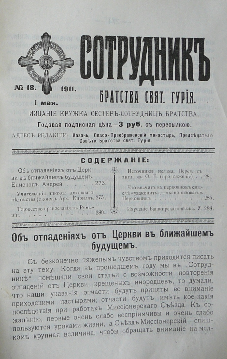 Обложка журнала "Сотрудник Братства святителя Гурия" (г. Казань, 1911 г., № 18)